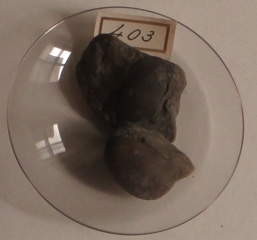 Fossil Leperditia - Took the picture at Teylers Museum, Haarlem